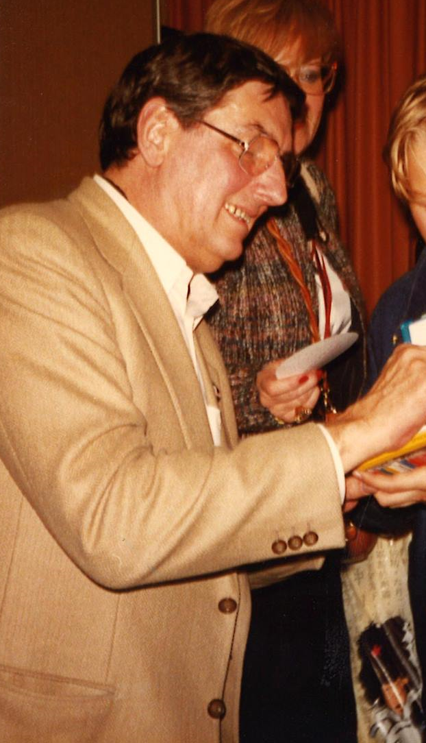 André Franquin lors du festival d'Angoulême en 1983.